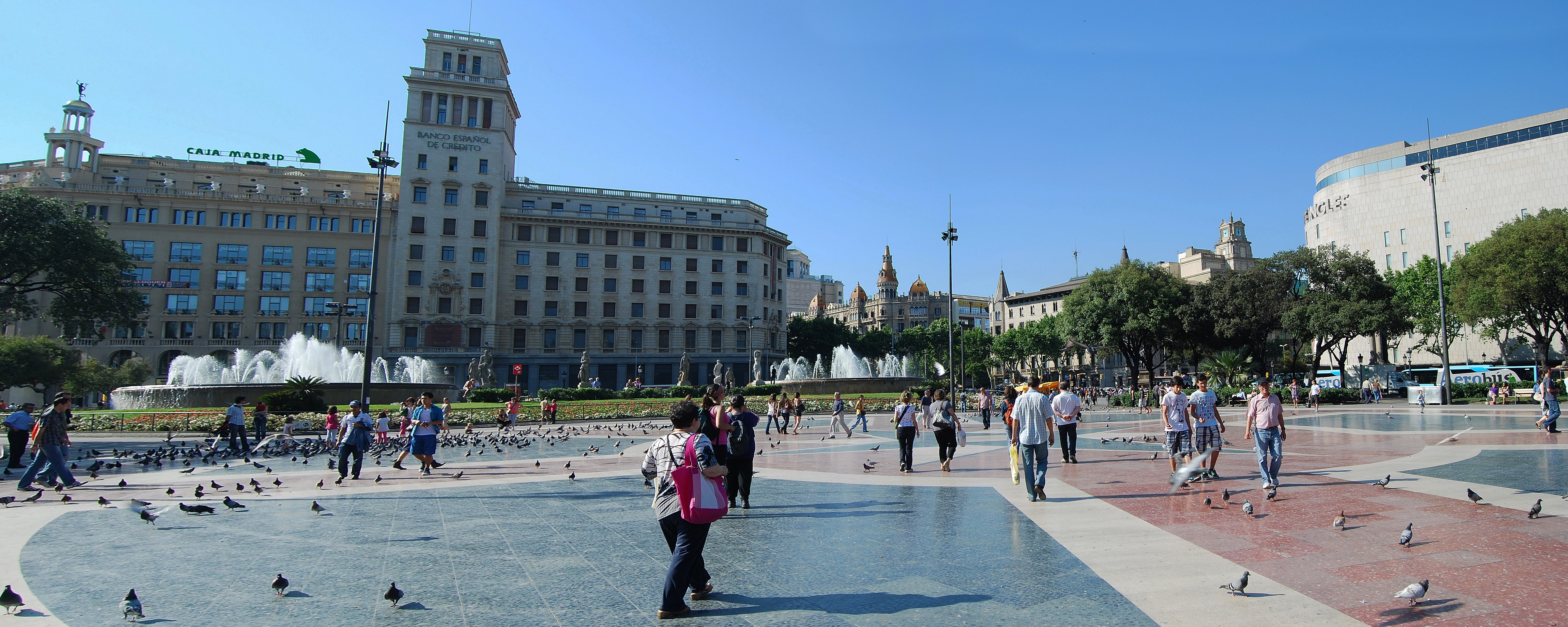 BARCELLONA, PLAZA DE CATALUNYA